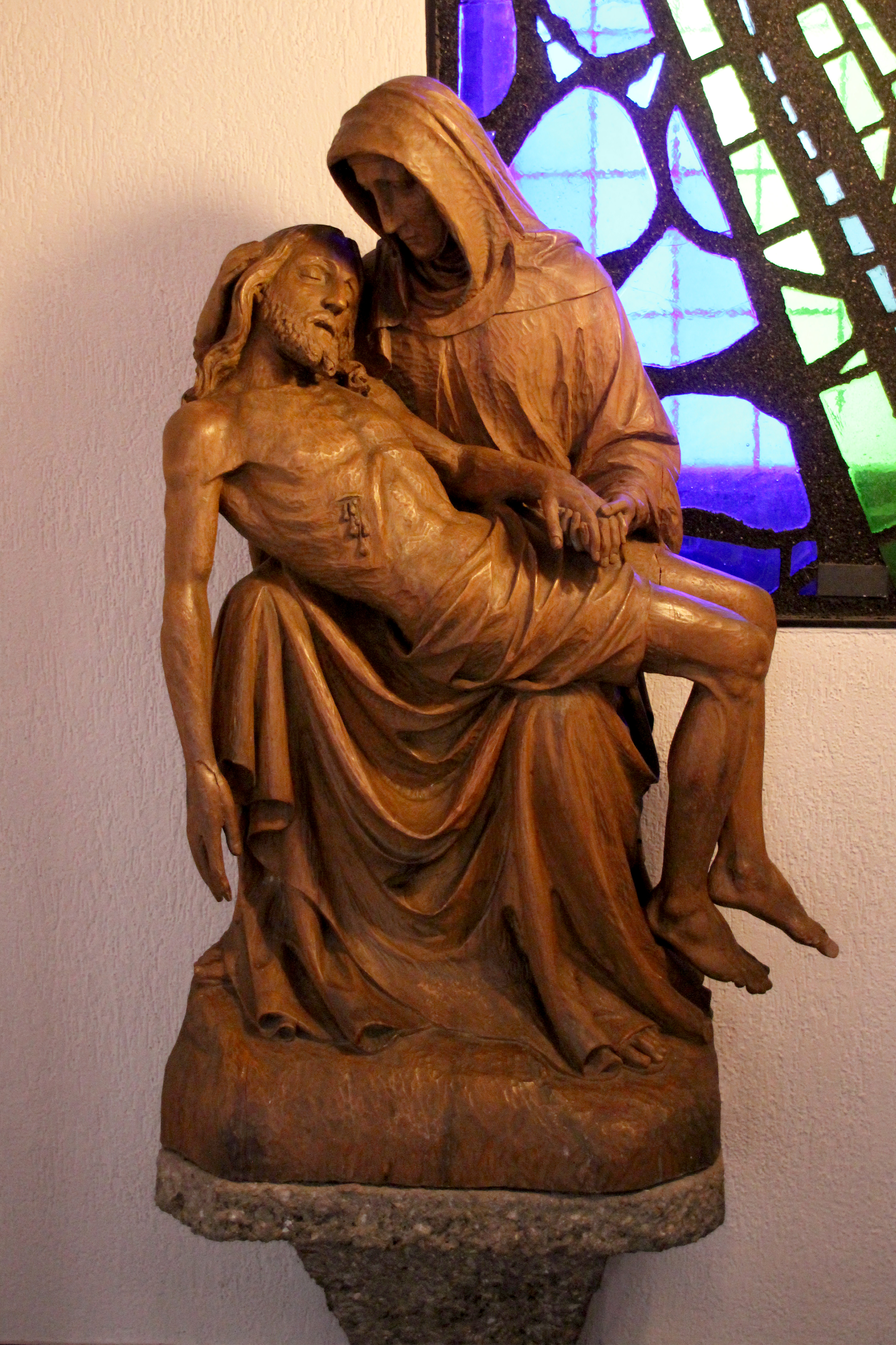 Pietá aus Holz in der Kirche St. Heribert in Eschweiler über Feld.